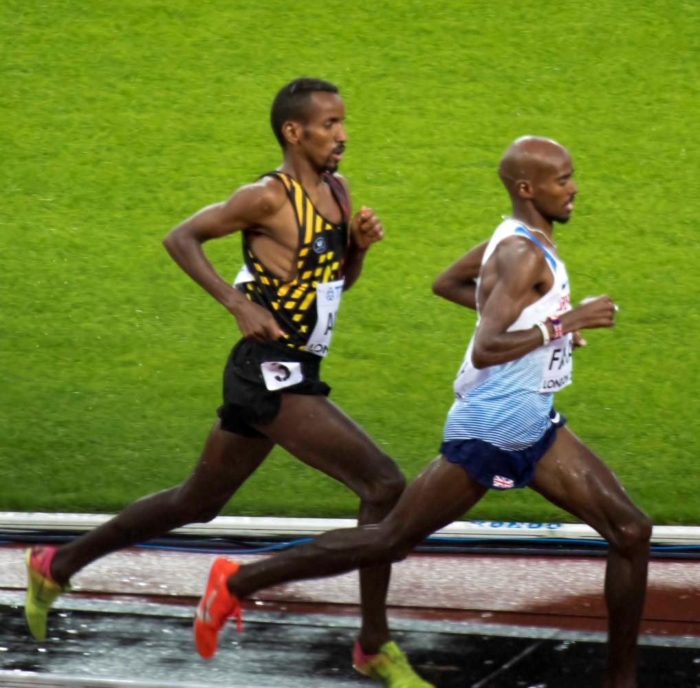 d5_3 5000m abdi farah